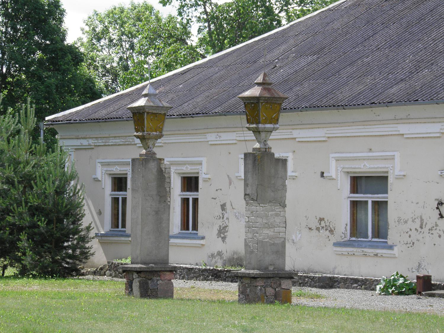 Antanašės dvaras (2)